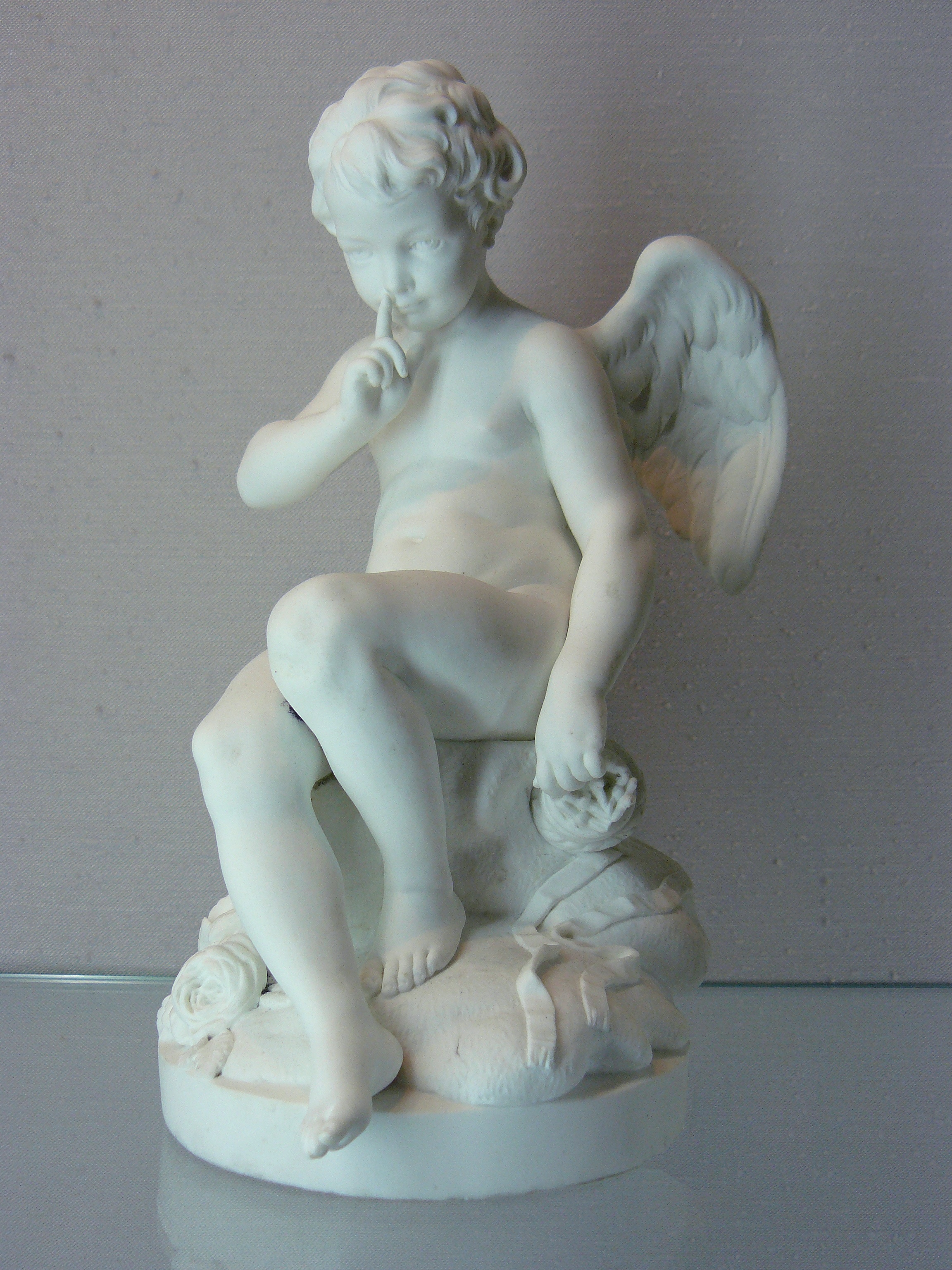 Statuette en biscuit de porcelaine tendre de Sèvres, Amour menaçant, d'après un modèle de Falconet, entre 1757 et 1766, hauteur environ 30 cm - Musée national de céramique (Sèvres, Hauts-de-Seine, France) Inv n° 27724